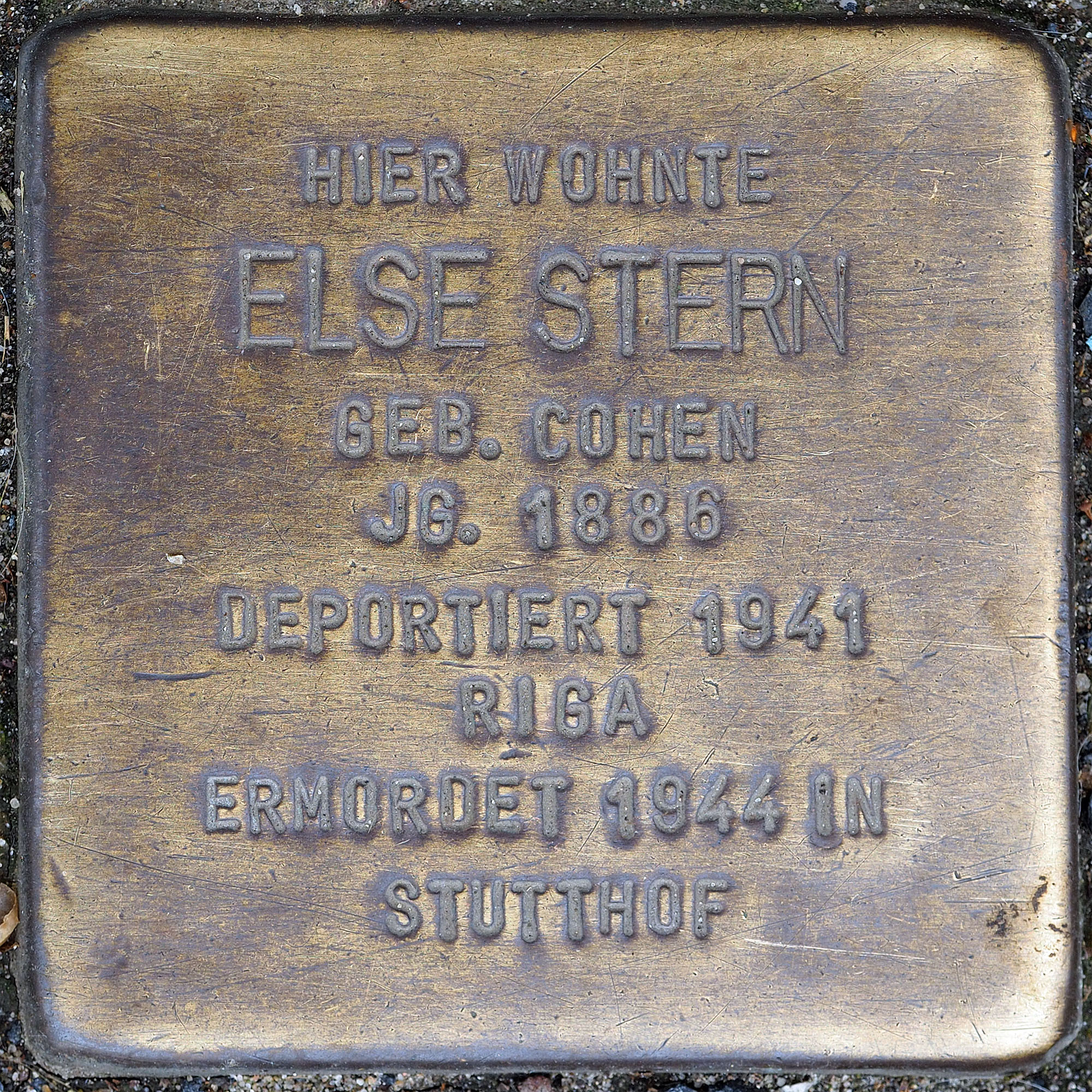 Stolpersteine MG: Stern, Else